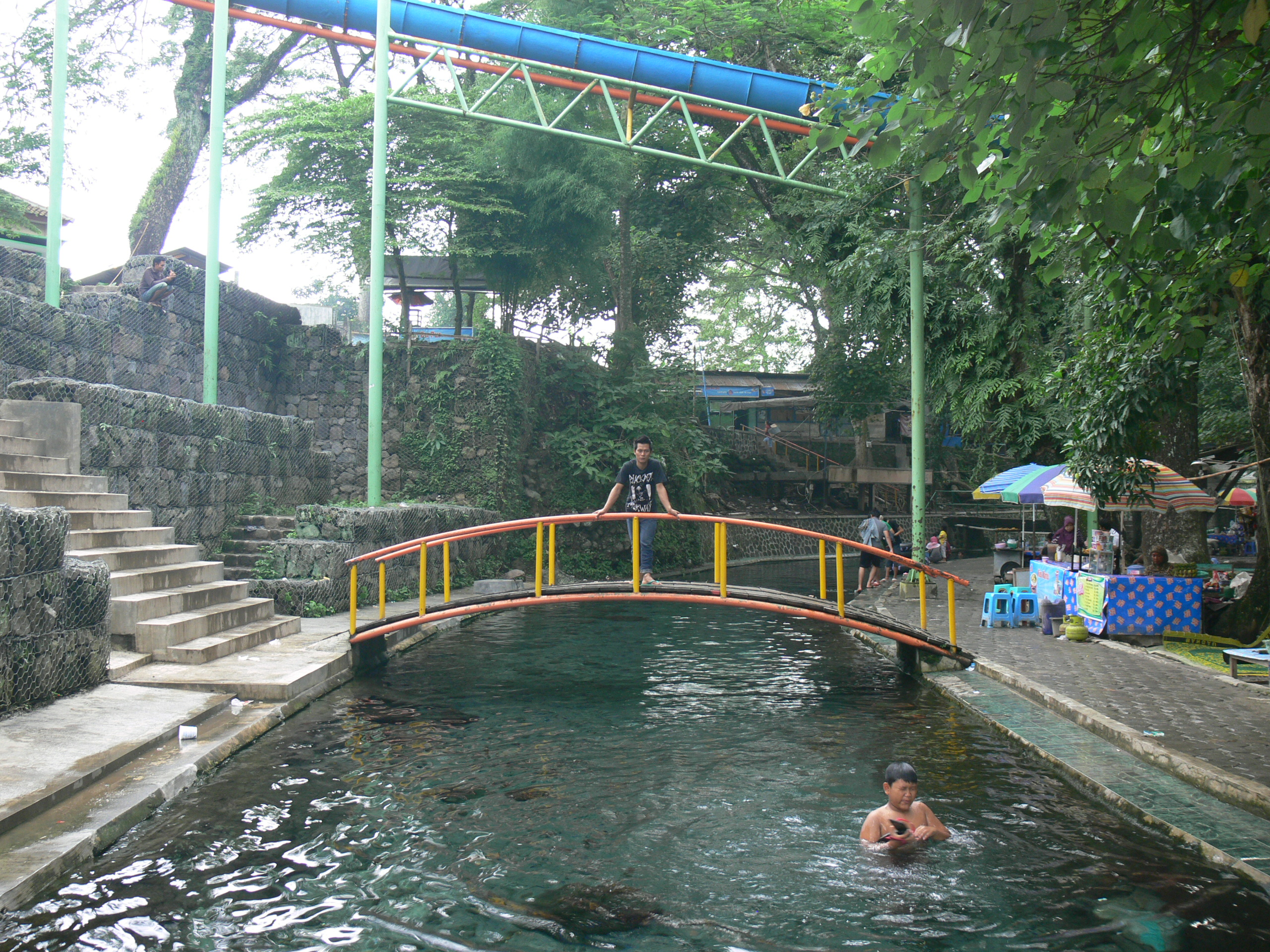 Cokro, Tulung, Klaten Regency, Central Java, Indonesia